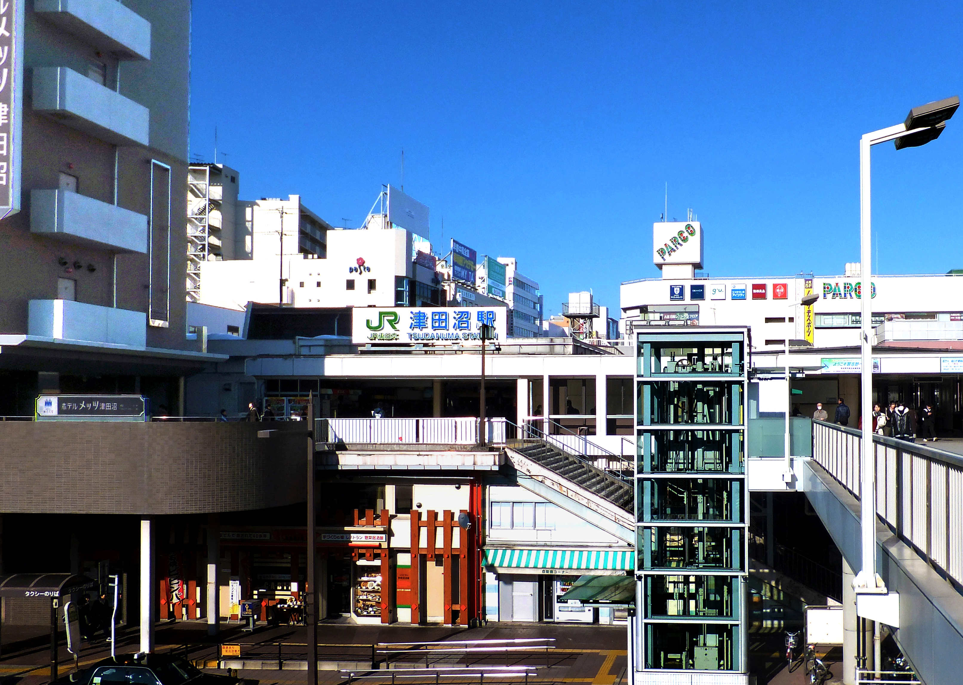 津田沼駅南口